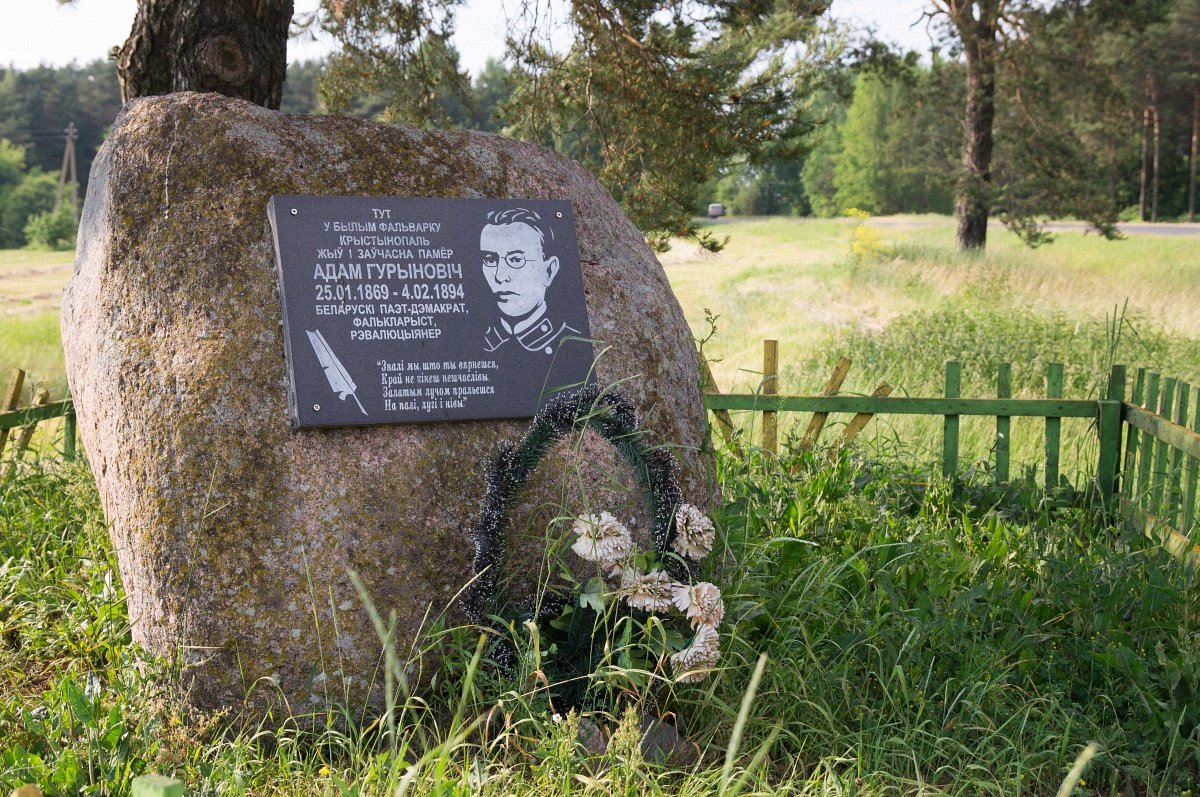 Золькі. Памятная дошка Адаму Гурыновічу